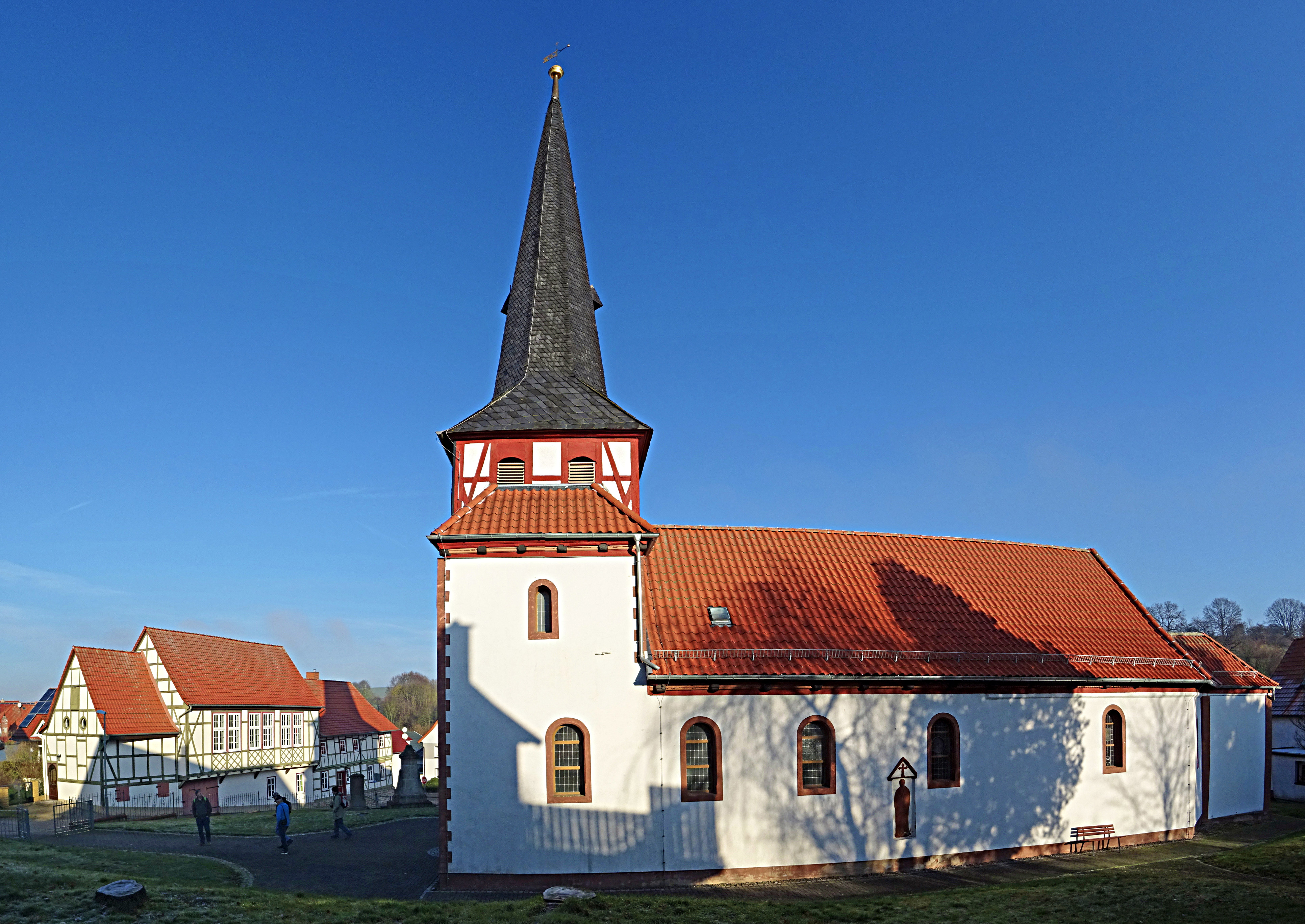 katholische Kirche St. Martin in Lüderode von Süden